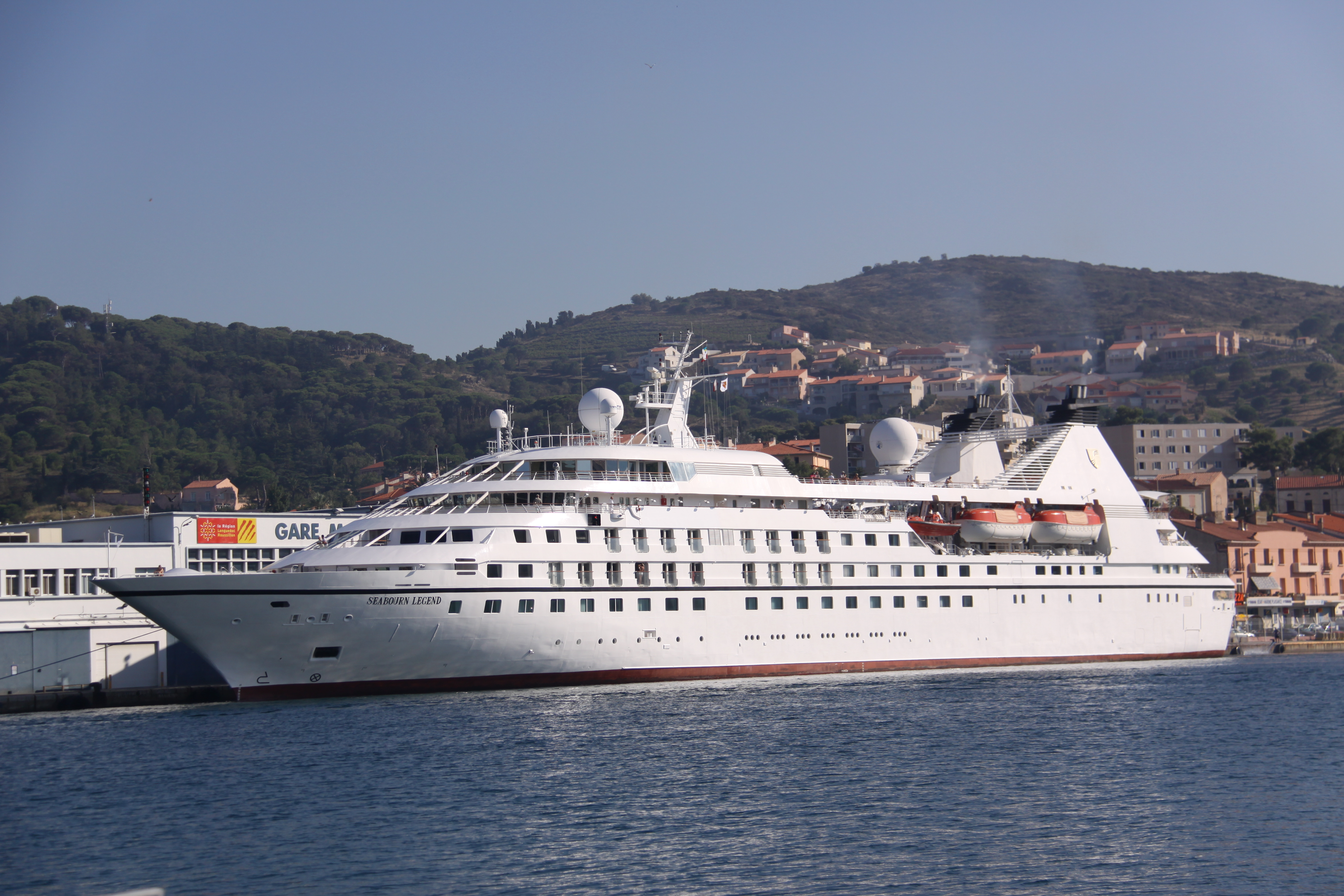 Le paquebot de croisière de luxe MS "Seabourn Legend" lors d'une escale à Port-Vendres. Ce navire de croisière de luxe a été mis en service en 1992. Il mesure 135 mètres de long et 19,60 mètres de large. La puissance de ses moteurs est de 7280 kw. Il a été construit pour transporter 208 passagers. Le nombre des membres de l' équipage est de 106 (un membre pour 2 passagers). Il appartient à la compagne maritime de croisière Seabourn Cruise Line. Le "Seabourn Legend" est immatriculé à Nassau, aux Bahamas. Avant 1996, ce navire a eu d' autres noms. Port-Vendres, Pyrénées-Orientales, France.